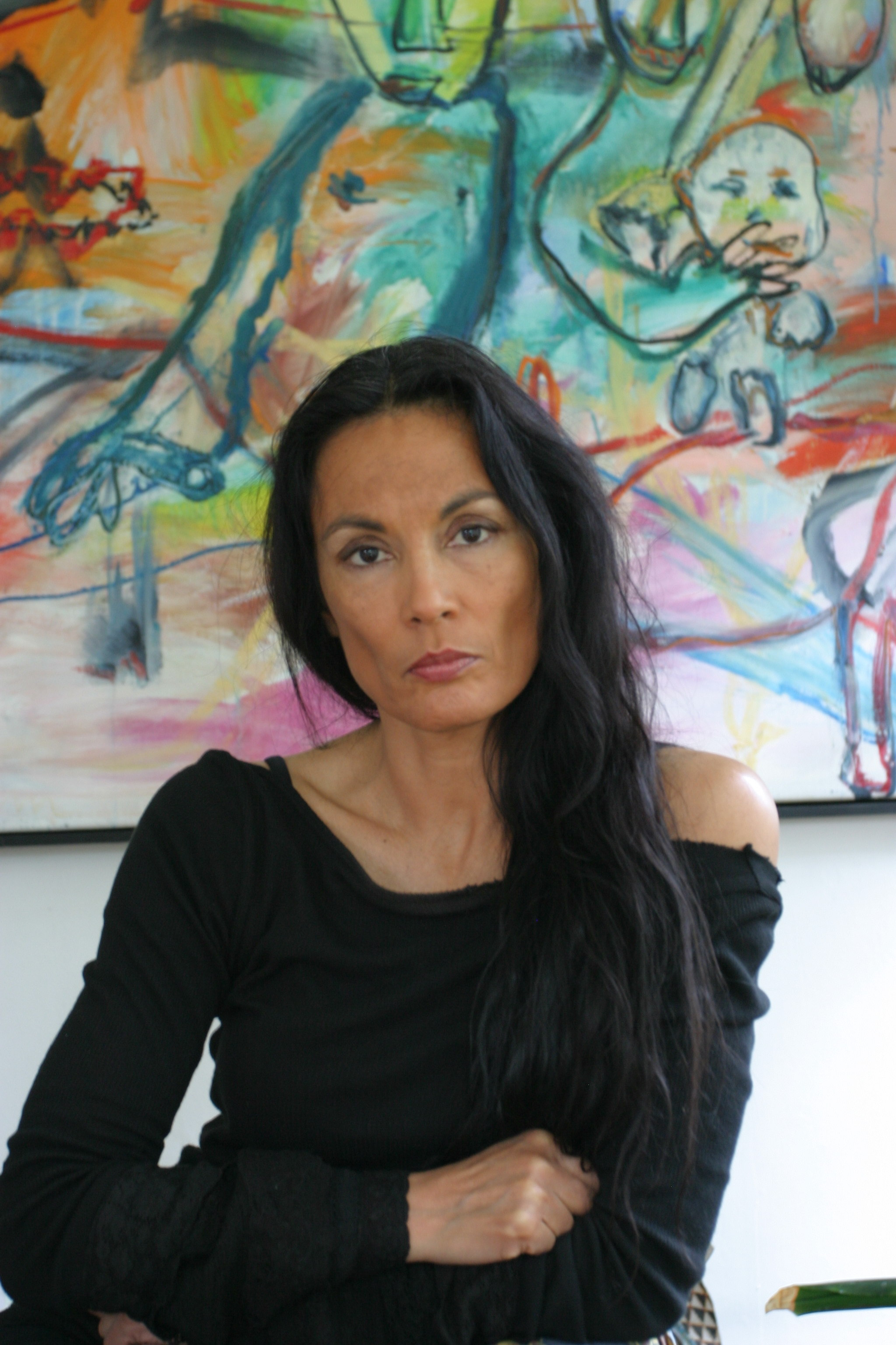 Foto van de schrijfster Marion Bloem